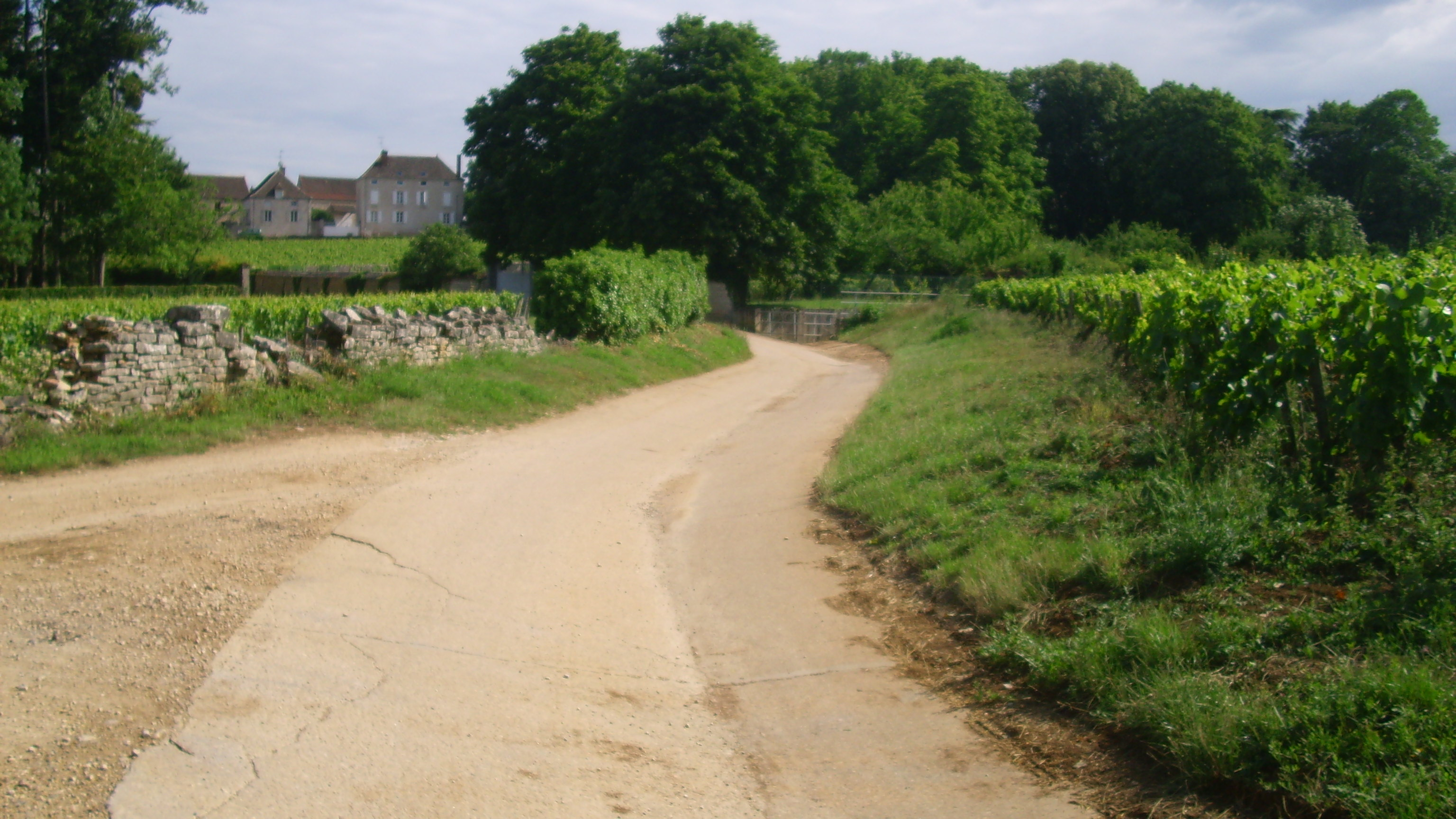 Voie découlement des eaux sur le vignoble de Mercurey